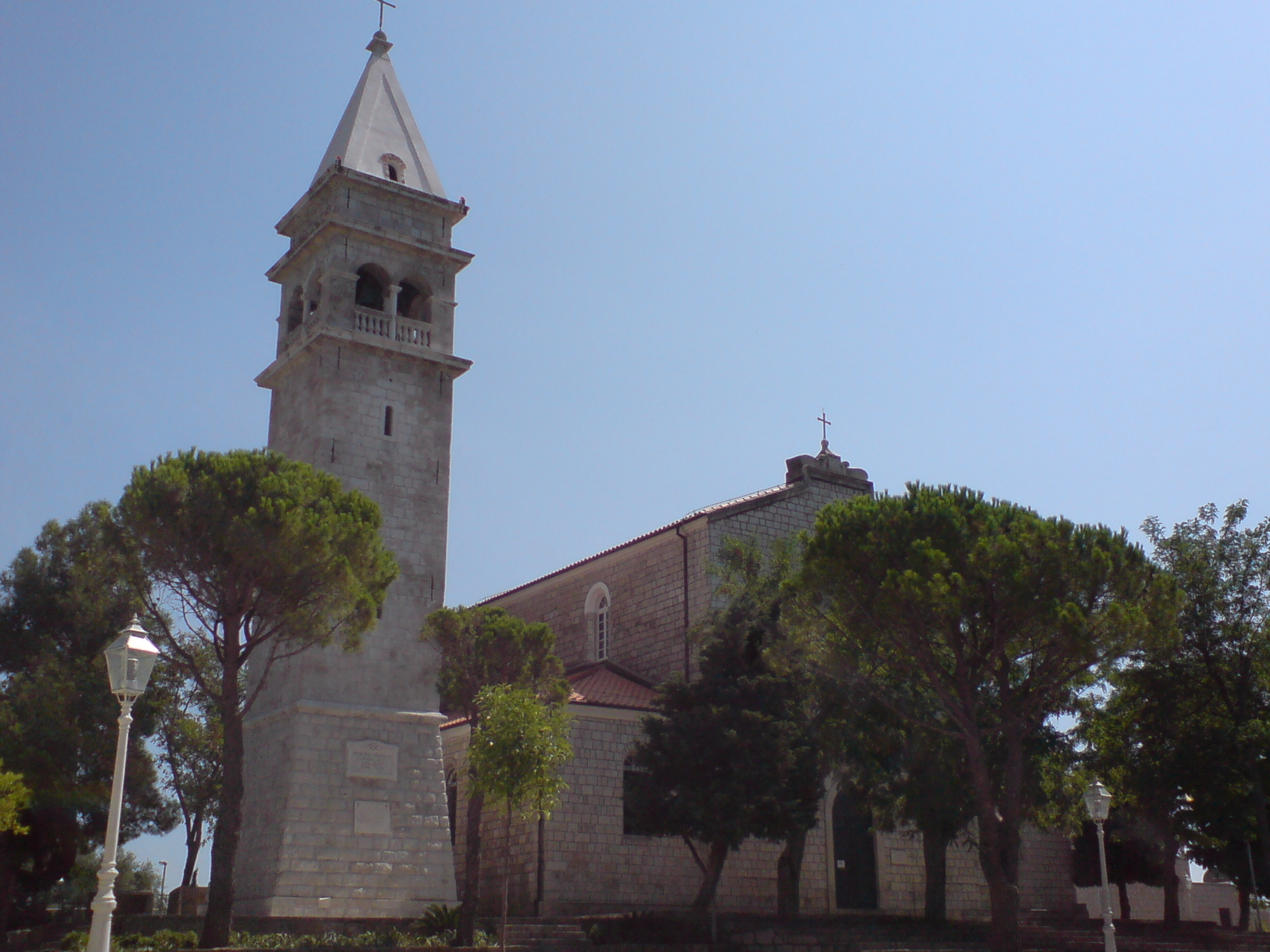 Čilipi in Konavle, Croatia